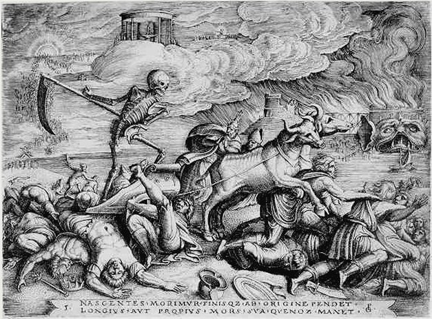 Pencz: Triumph des Todes, Kupferstich